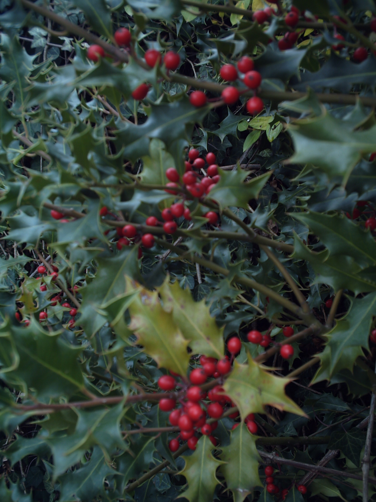 Branche de houx rouge (Ilex aquifolium).